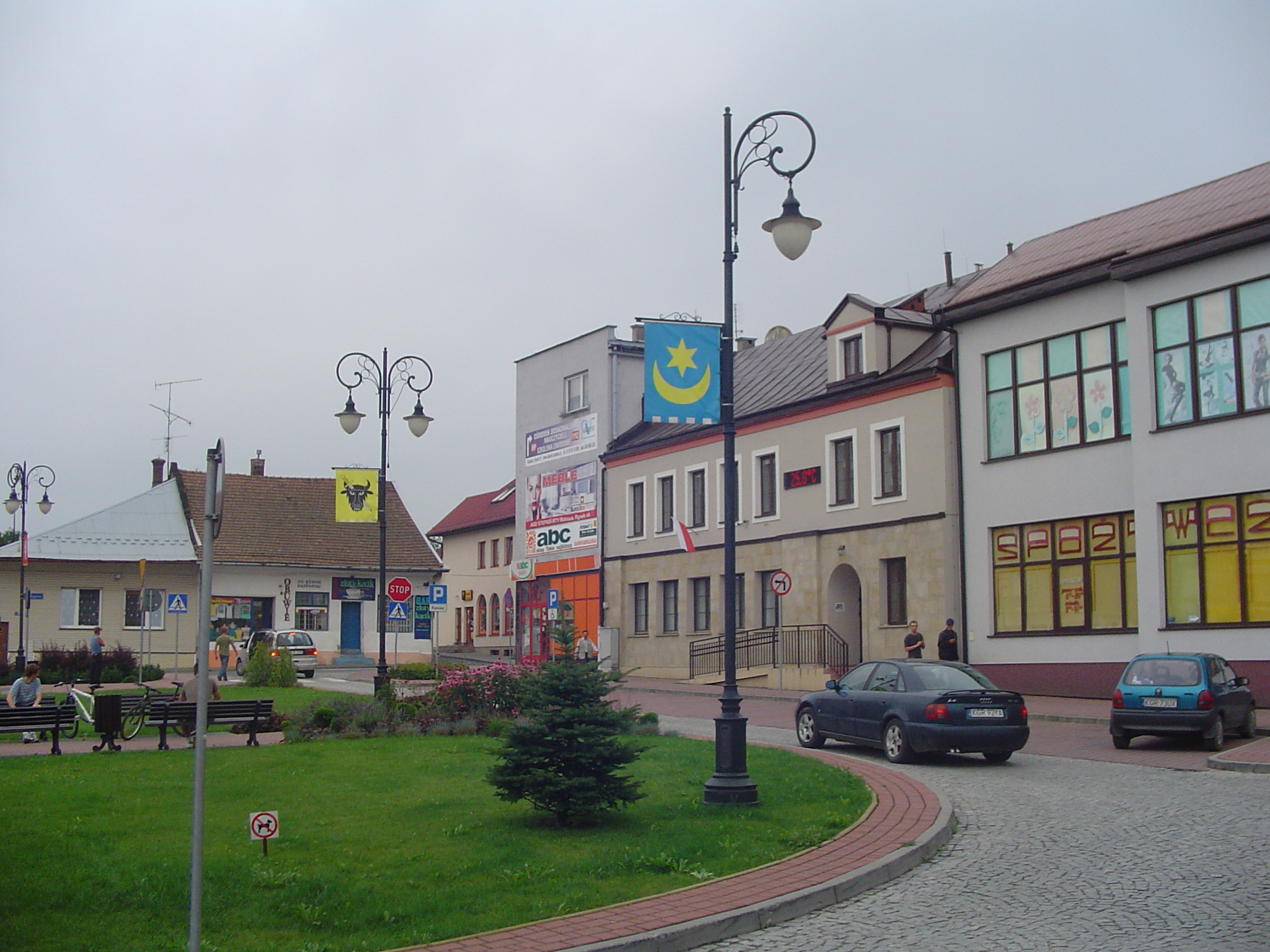 Rynek w Bobowej (widok na część południowo-wschodnią)